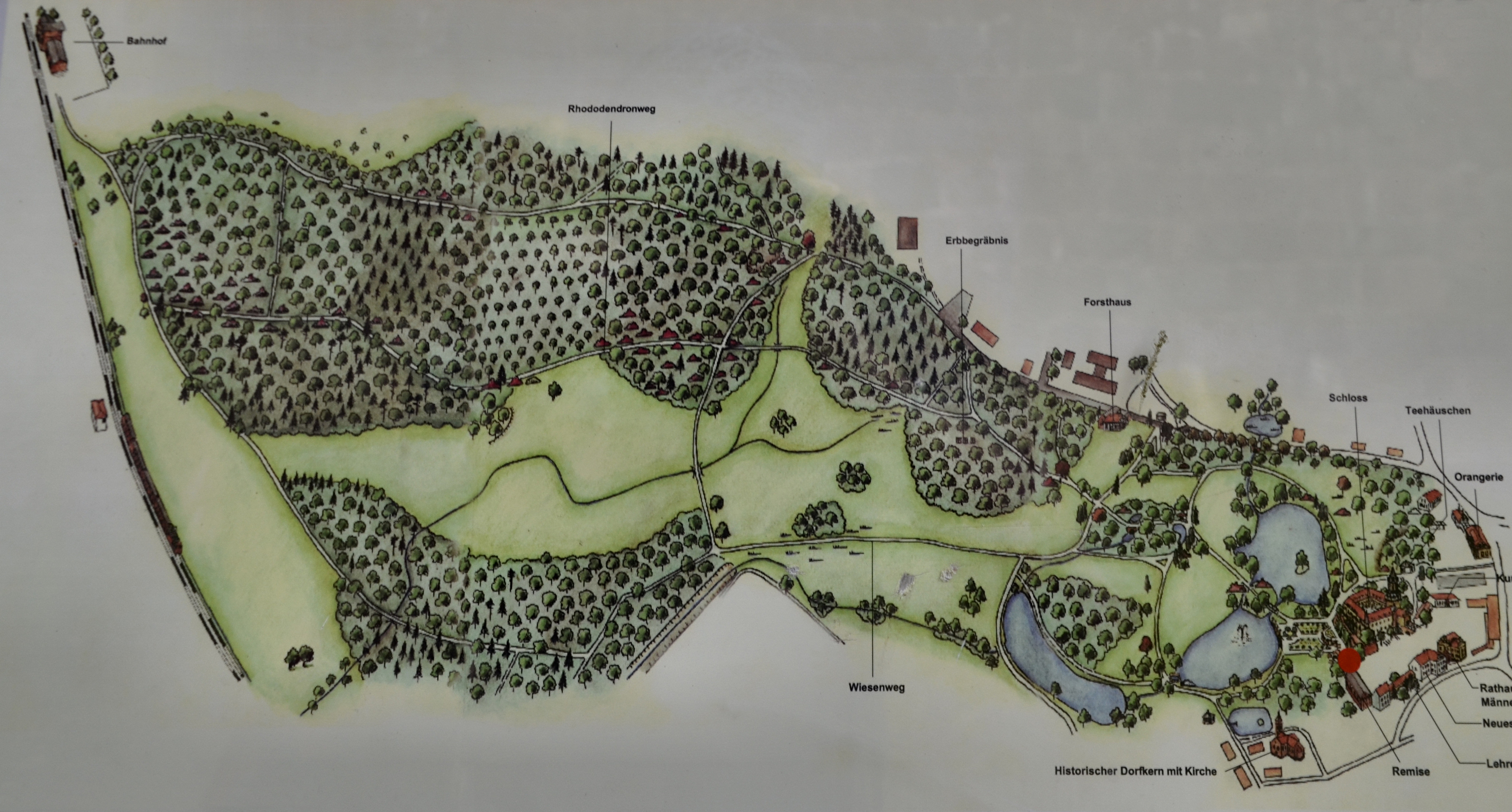 Plan des Schlosparks Wiesenburg